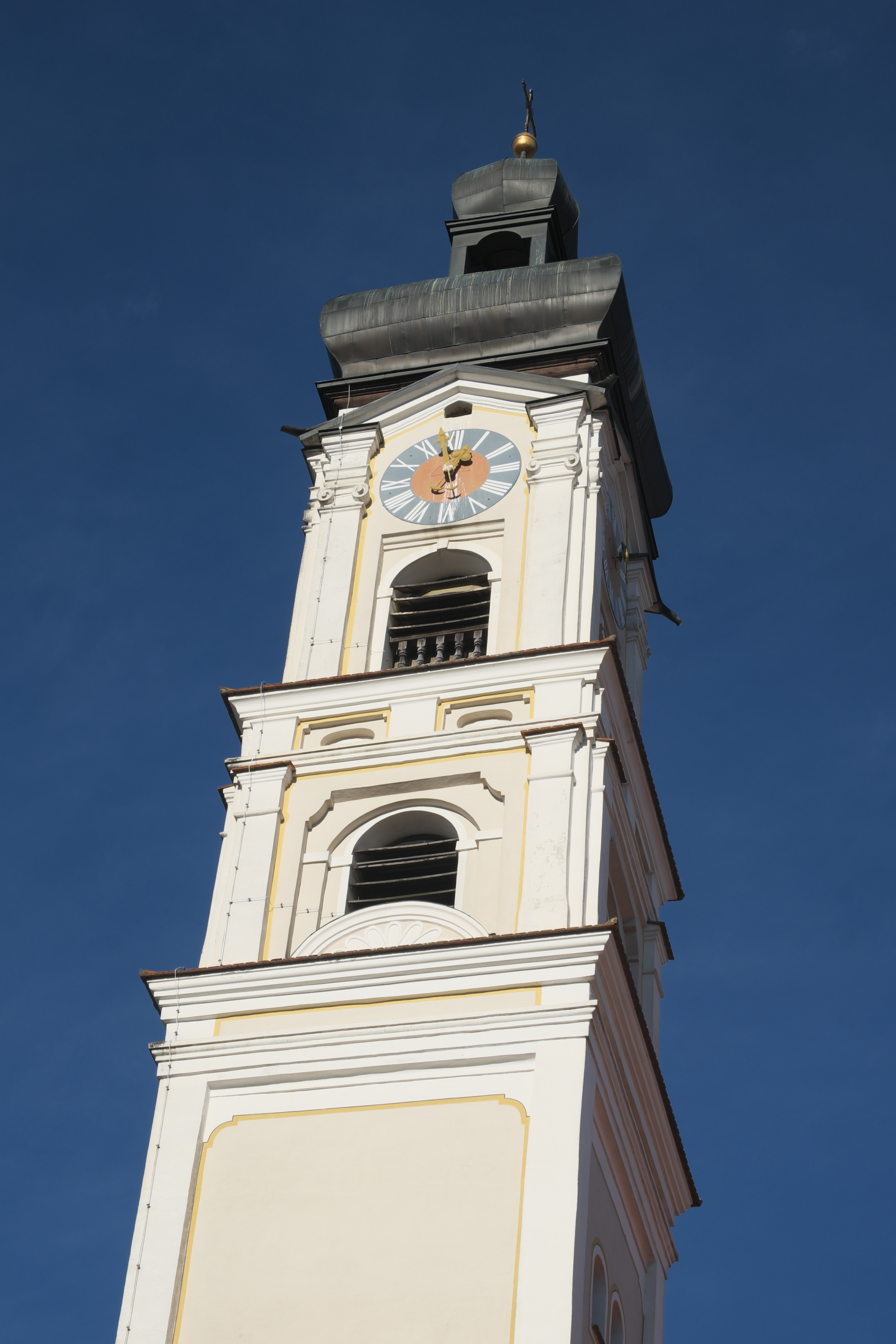 Katholische Pfarrkirche St. Emmeram, ehemalige Benediktinerinnen-Klosterkirche Mariä Himmelfahrt, in Geisenfeld im Landkreis Pfaffenhofen an der Ilm (Bayern/Deutschland)